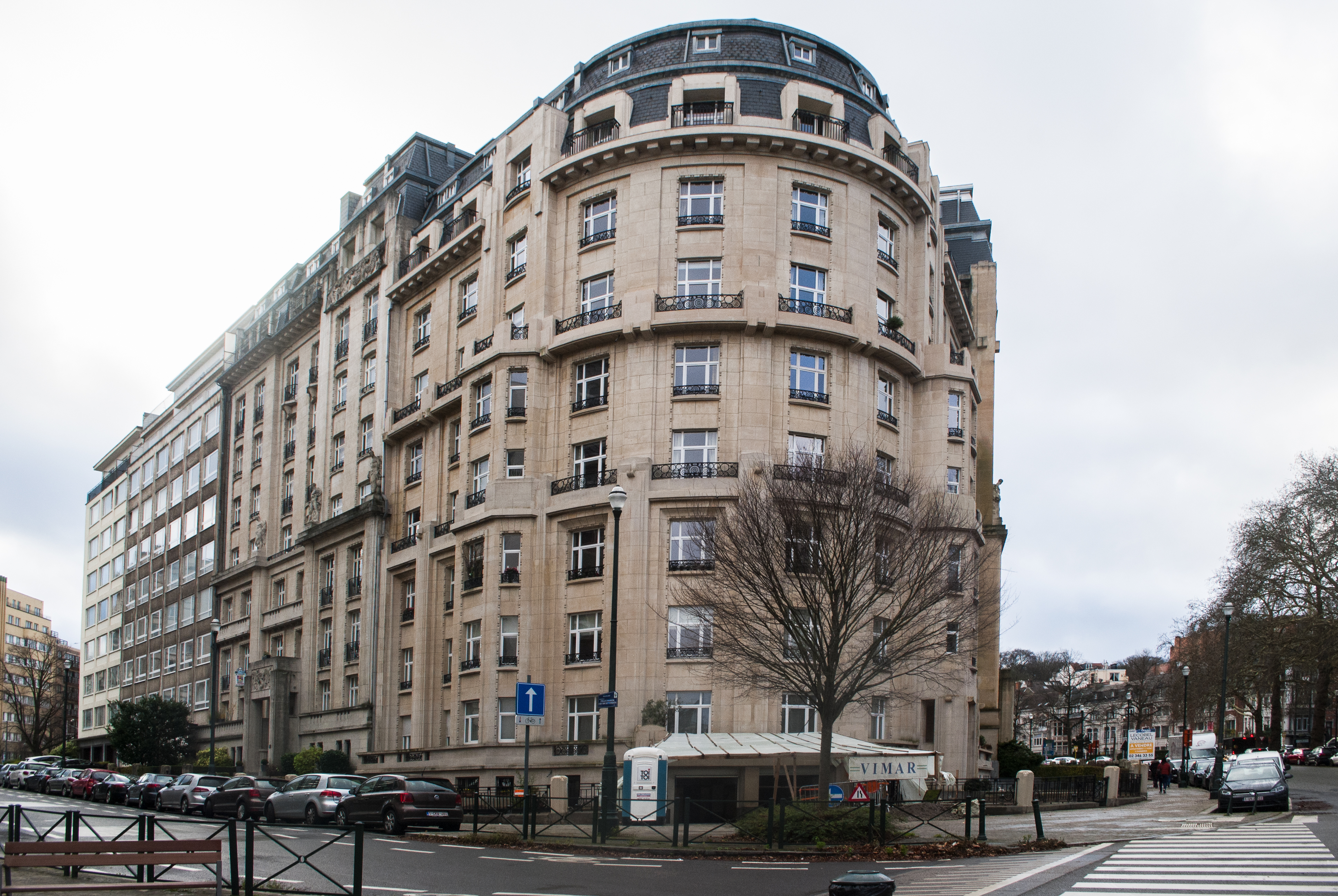 Immeuble à apparetements